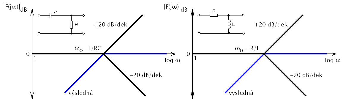 Logaritmická ampl. frekv. char. derivačního článku